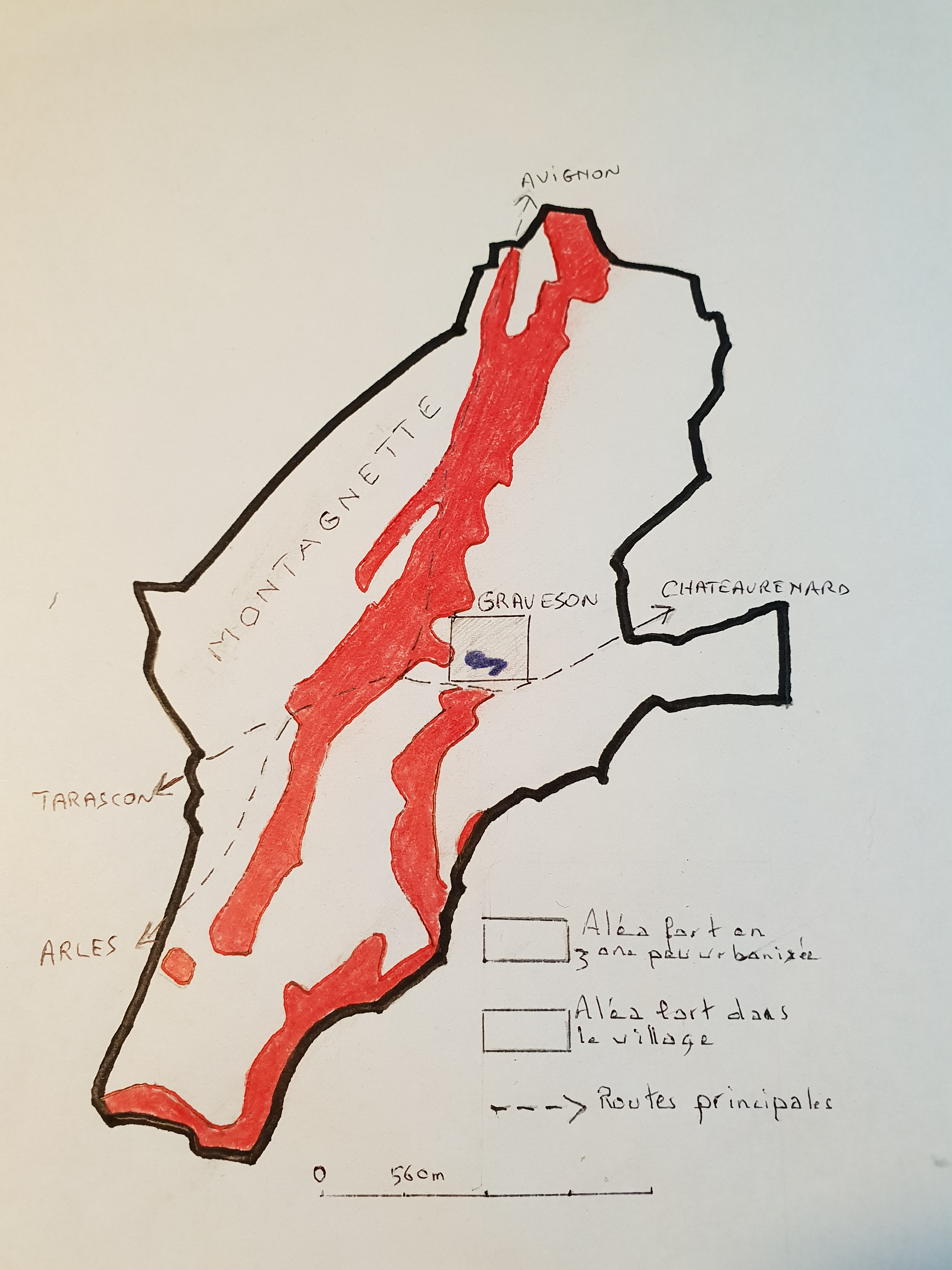 Carte créée en 2016 pour le plan de prévention lié aux risques